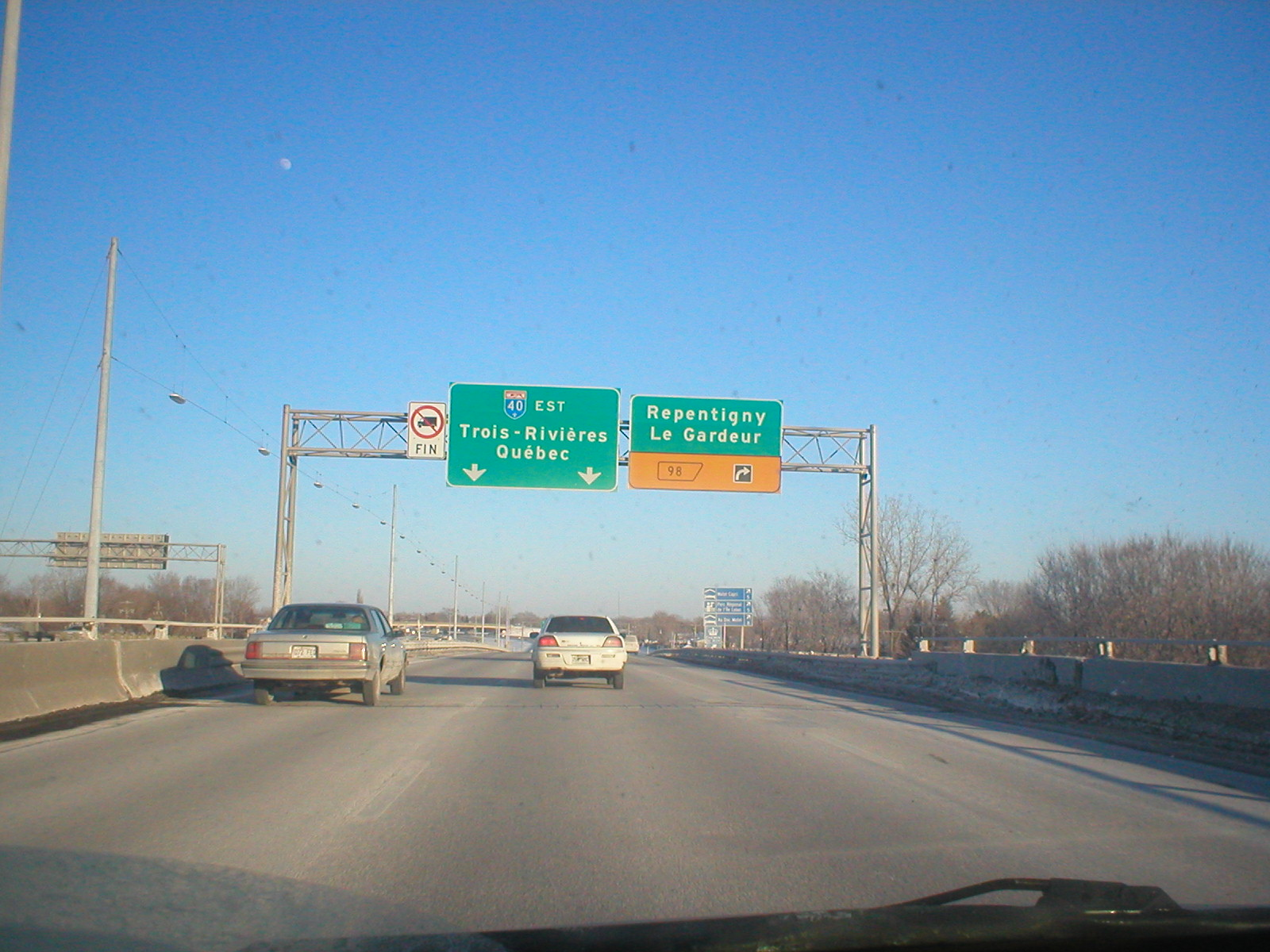 Autoroute 40 à la hauteur de Repentigny